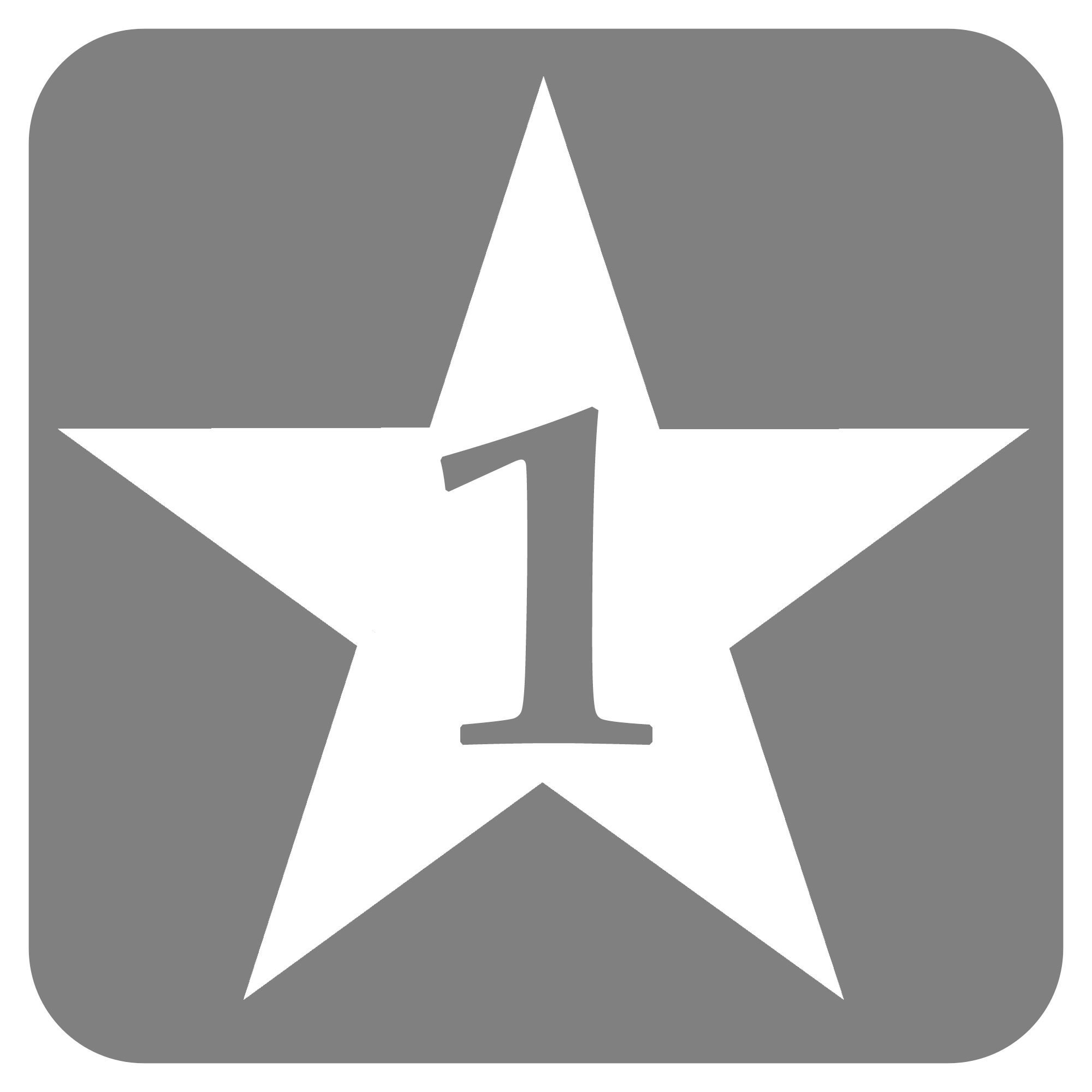 Símbolo utilizado para identificar a la estación Buin en 2001.